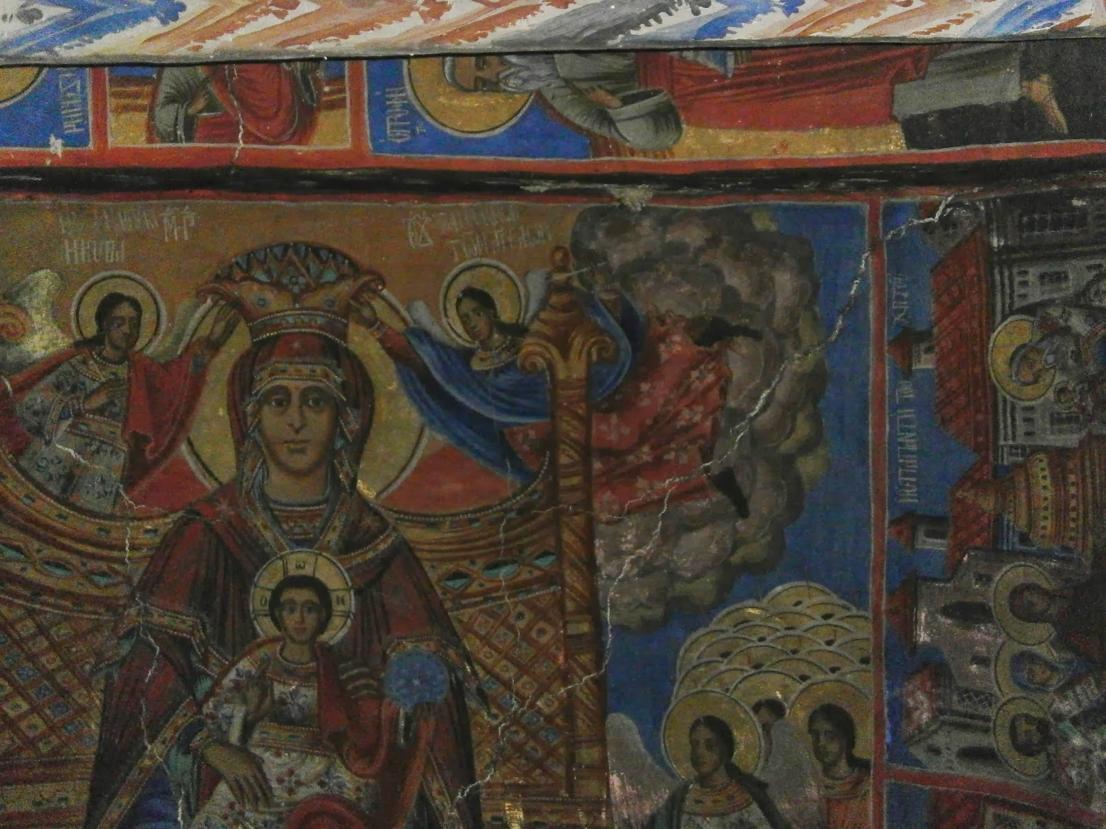 Фреска в църквата "Свети Димитър", Гилофос, Гърция.